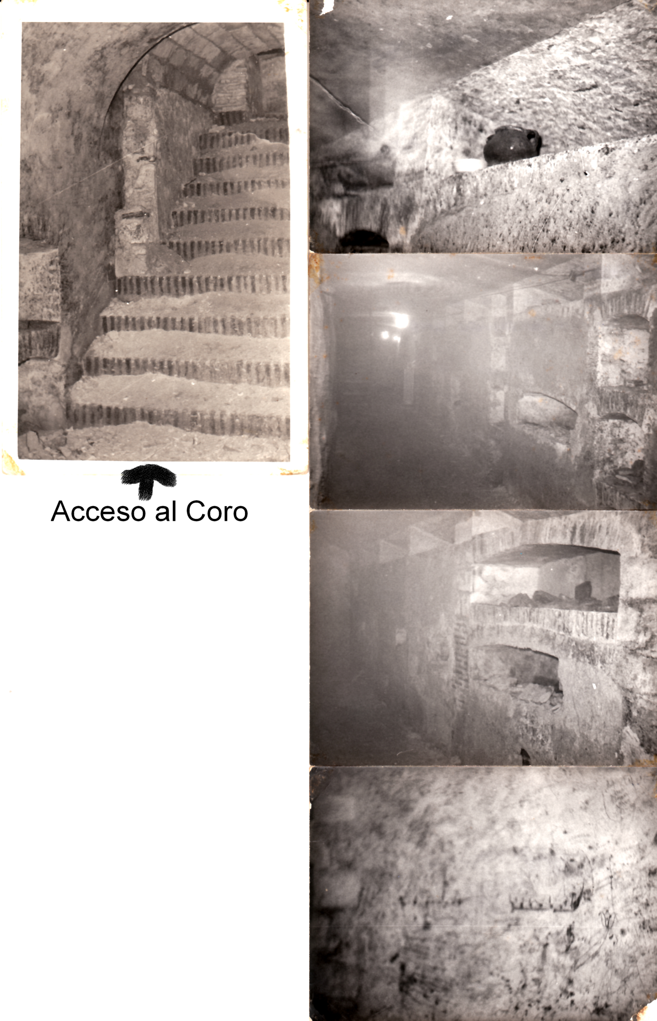 Imagen de las catacumbas